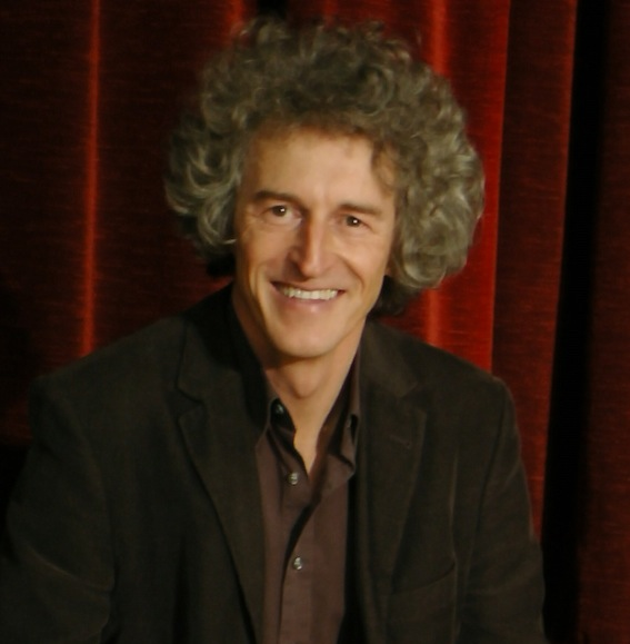 Portrait des Gründers, Norbert Kober, von Goldmund e-V.